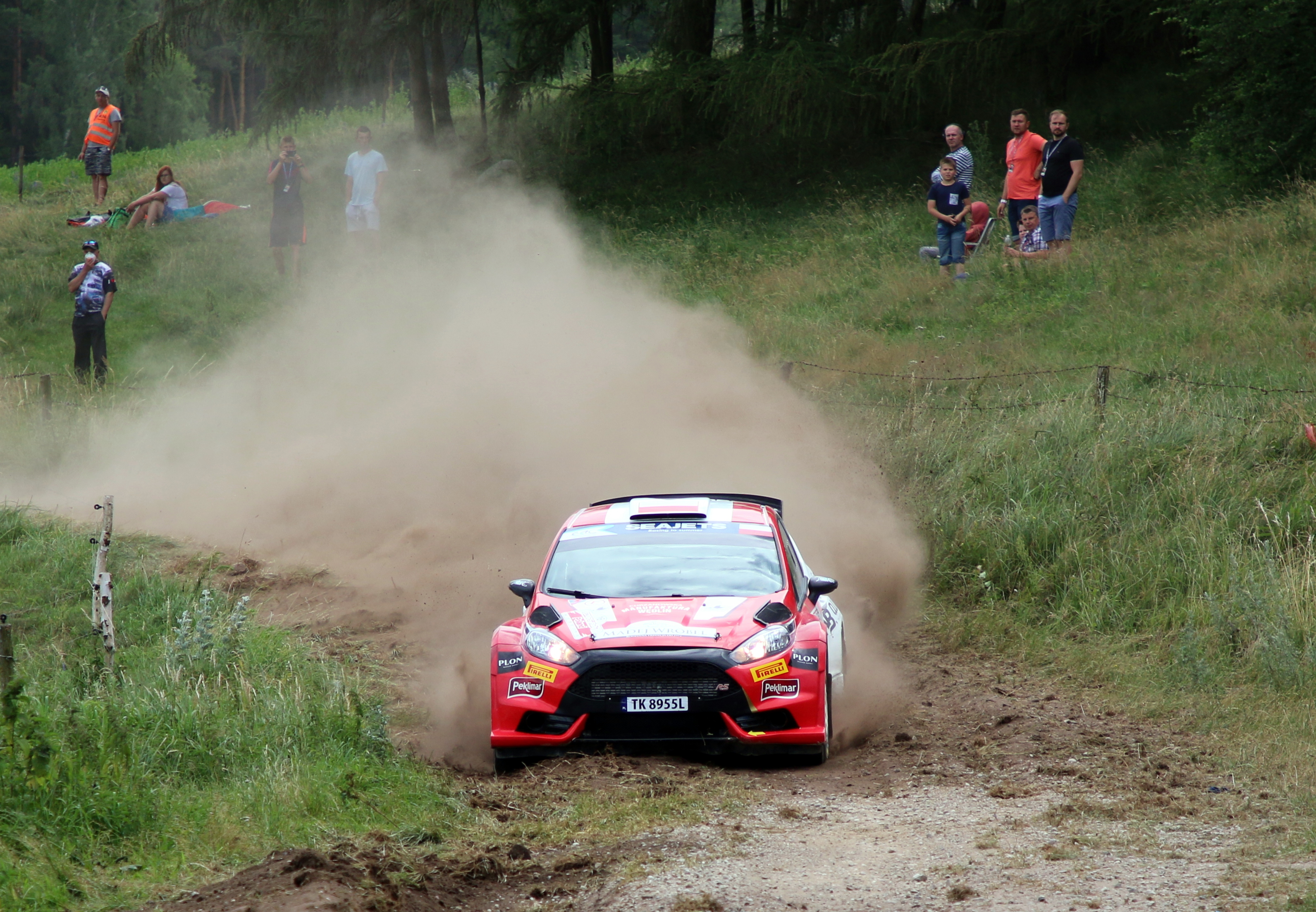 Jarosław Kołtun podczas Rajdu Polski 2019